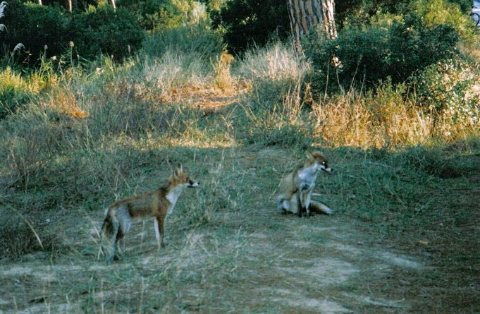 Volpi nella Pineta Granducale di Marina di Alberese (GR). Lavoro personale di Vinattieri Matteo che lascia in pubblico dominio il 27/01/2007; foto scattata da apparecchio non digitale nell'autunno 2003 e rielaborata in seguito.